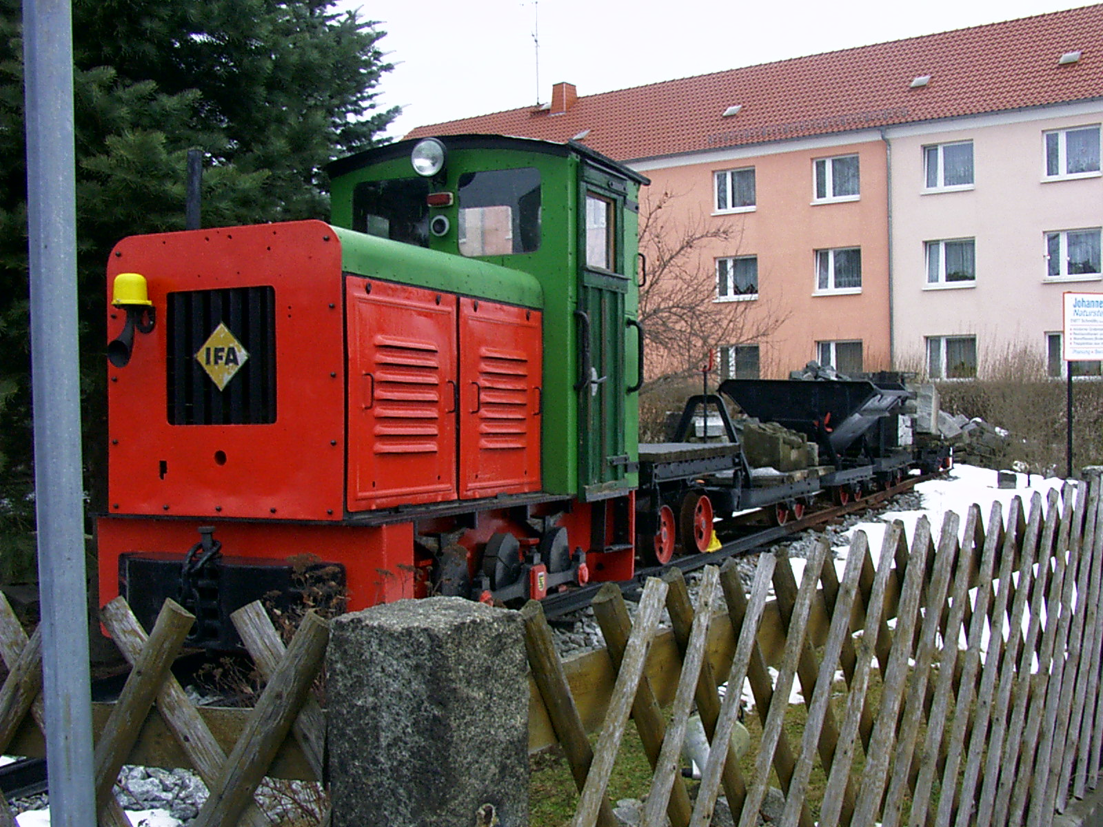 Technisches Denkmal in Demitz-Thumitz